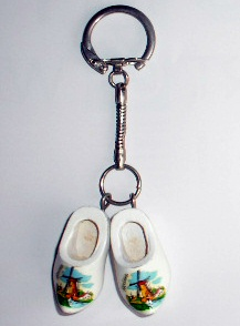 Souvenir sleutelhanger hollandse klompjes, verzameling